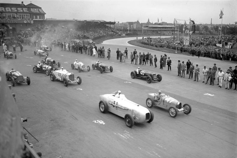 Das grosse internationale Automobilrennen auf der Avus 1932 ! Der Start der schweren Maschinen auf der Avus, im Vordergrund der Sieger von Brauchitsch, Mercedes.